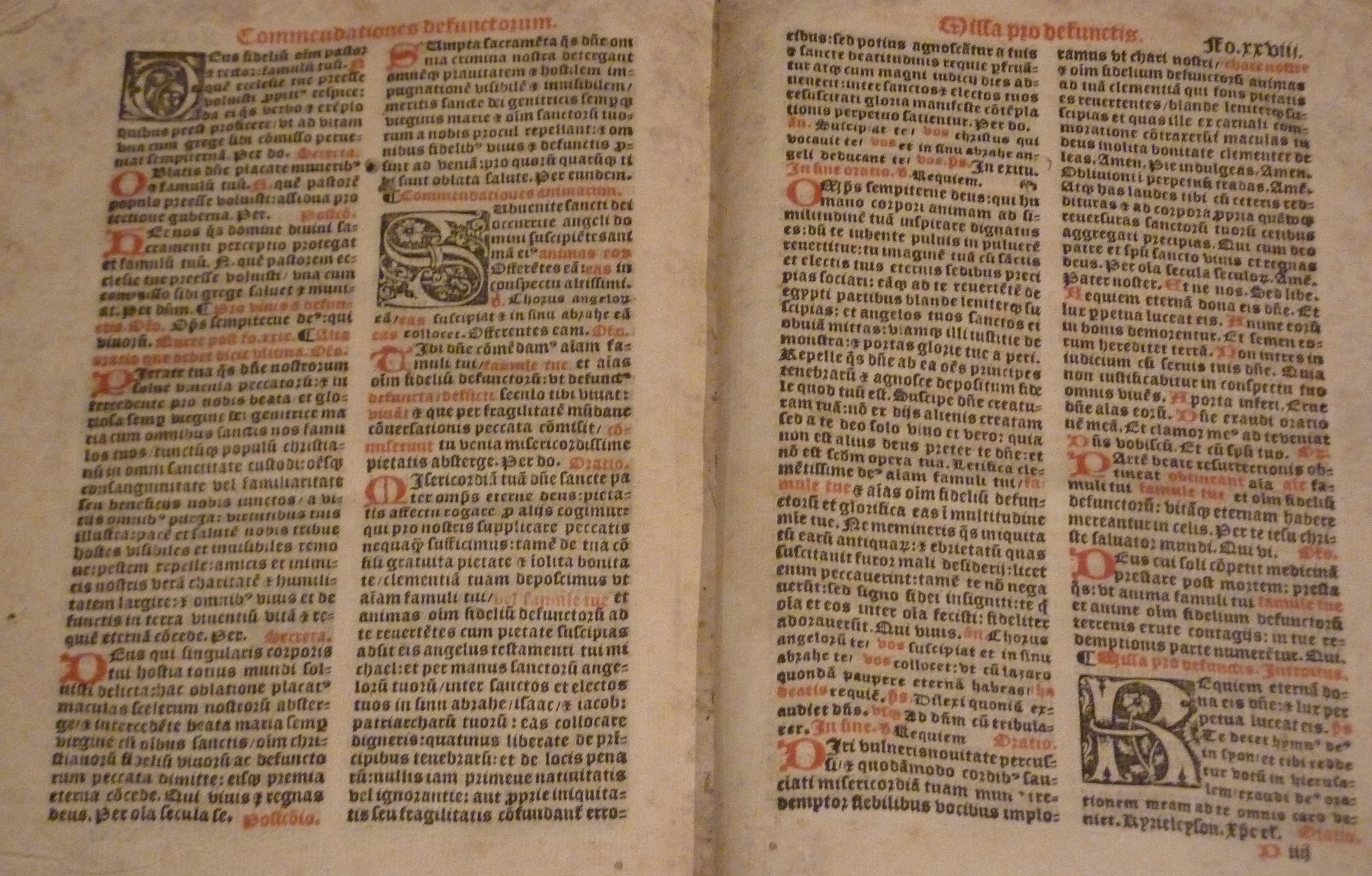 Missel du diocèse de Léon (1526, Yves Quillivéré, écrit en caractères gothiques rouges et noirs). Ce missel est le premier texte imprimé en breton après le Catholicon de Jehan Lagadeuc (abbaye Saint-Guénolé de Landévennec)